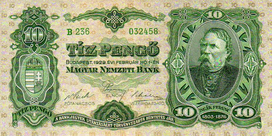 10 Hungarian pengő (1929) - obverse